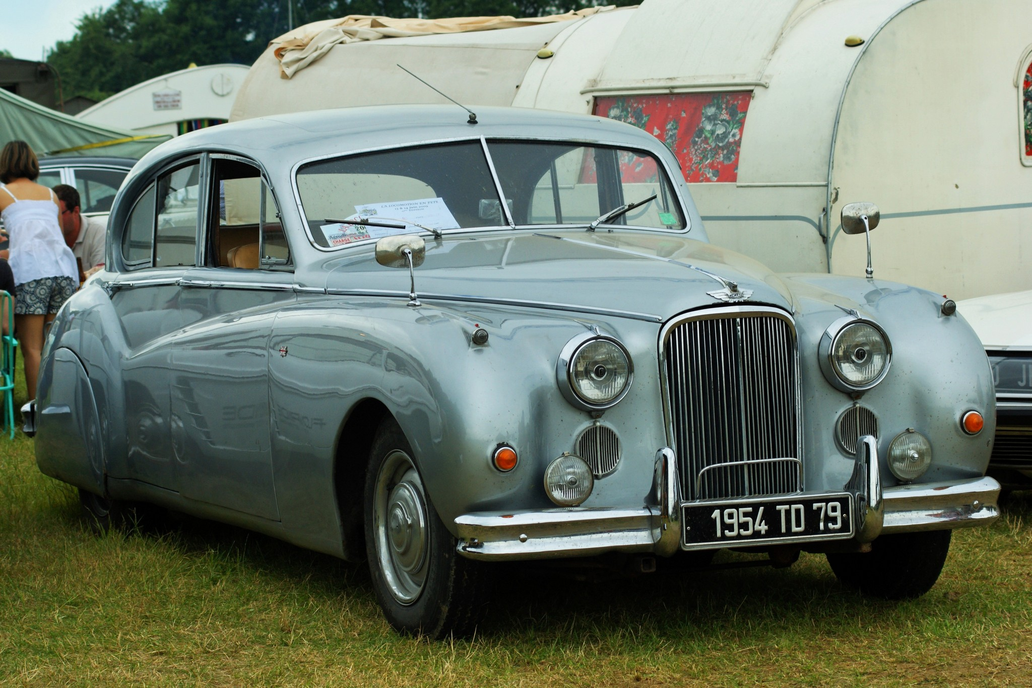 Vu lors de la Locomotion en fête - 2009